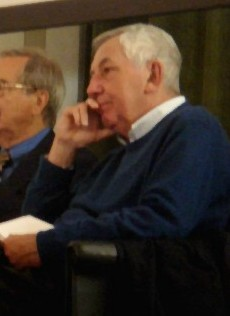 Mario Lavagetto, Pordenone, 2010.